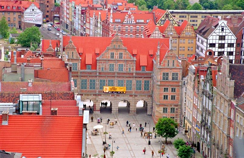 Główne Miasto